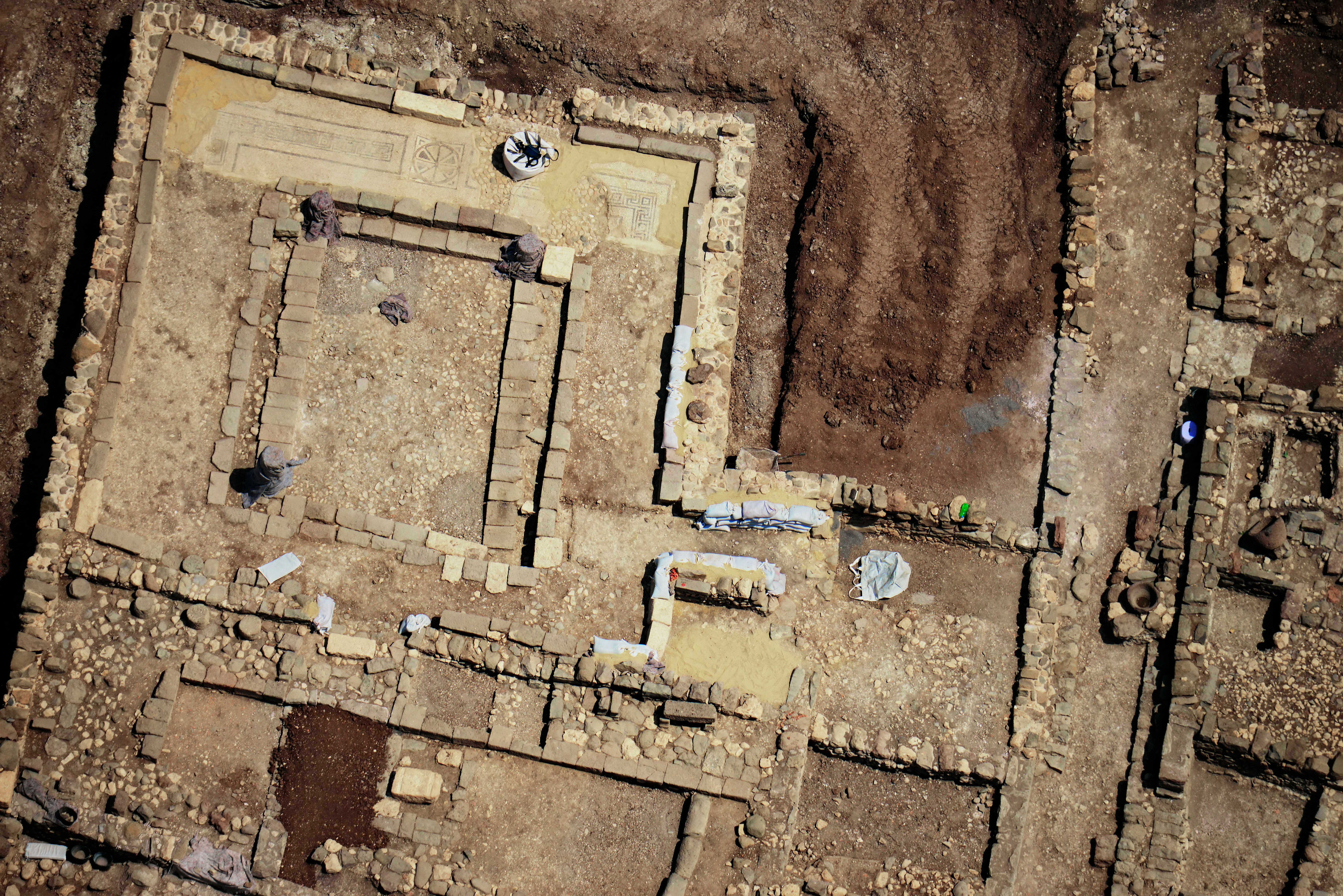 עיר קדומה בגליל, ששכנה לחוף הכנרת, בדרום בקעת גינוסר, סמוך ליישוב מגדל של היום המשמר את שמה. עד להקמת העיר טבריה בשנת 20 לספירה, הייתה מגדלא המרכז העירוני היחיד בחוף המערבי של הכנרת.